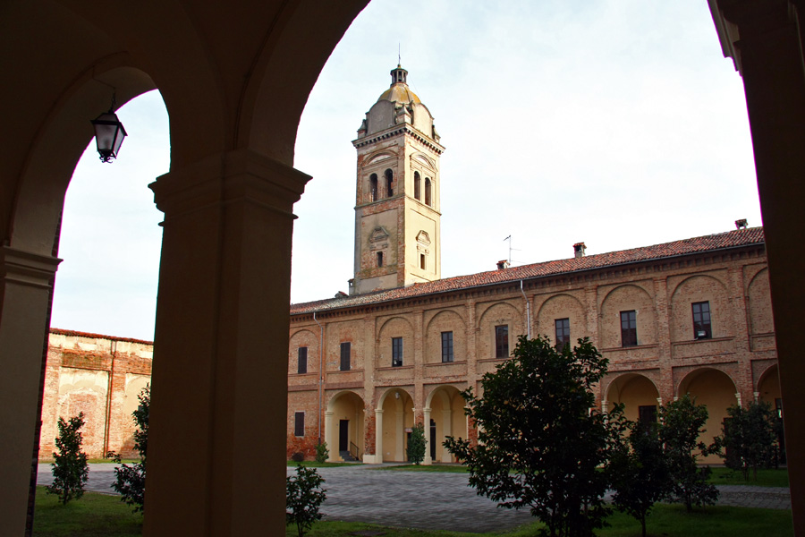 Blick auf den Innenhof der ehemaligen Benediktinerabtei San Pietro in der norditalienischen Gemeinde Breme (Provinz Pavia)